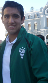 Fotografía de Ronnie Fernández, jugador de Santiago Wanderers.